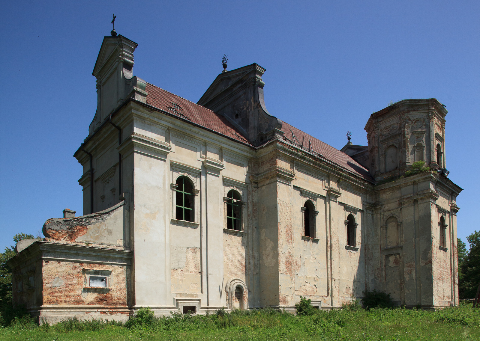 Костел Успіння Пресвятої Богородиці (мур.) 1642, 1695 рр.